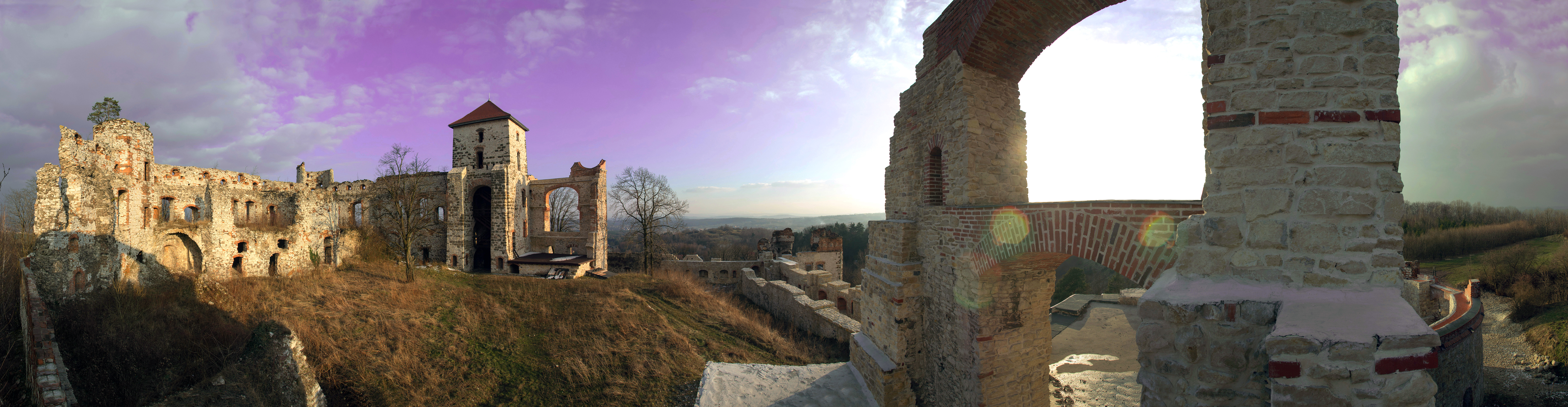 Zamek Tenczyn (Tęczyn) – ruiny zamku leżącego na Jurze Krakowsko-Częstochowskiej